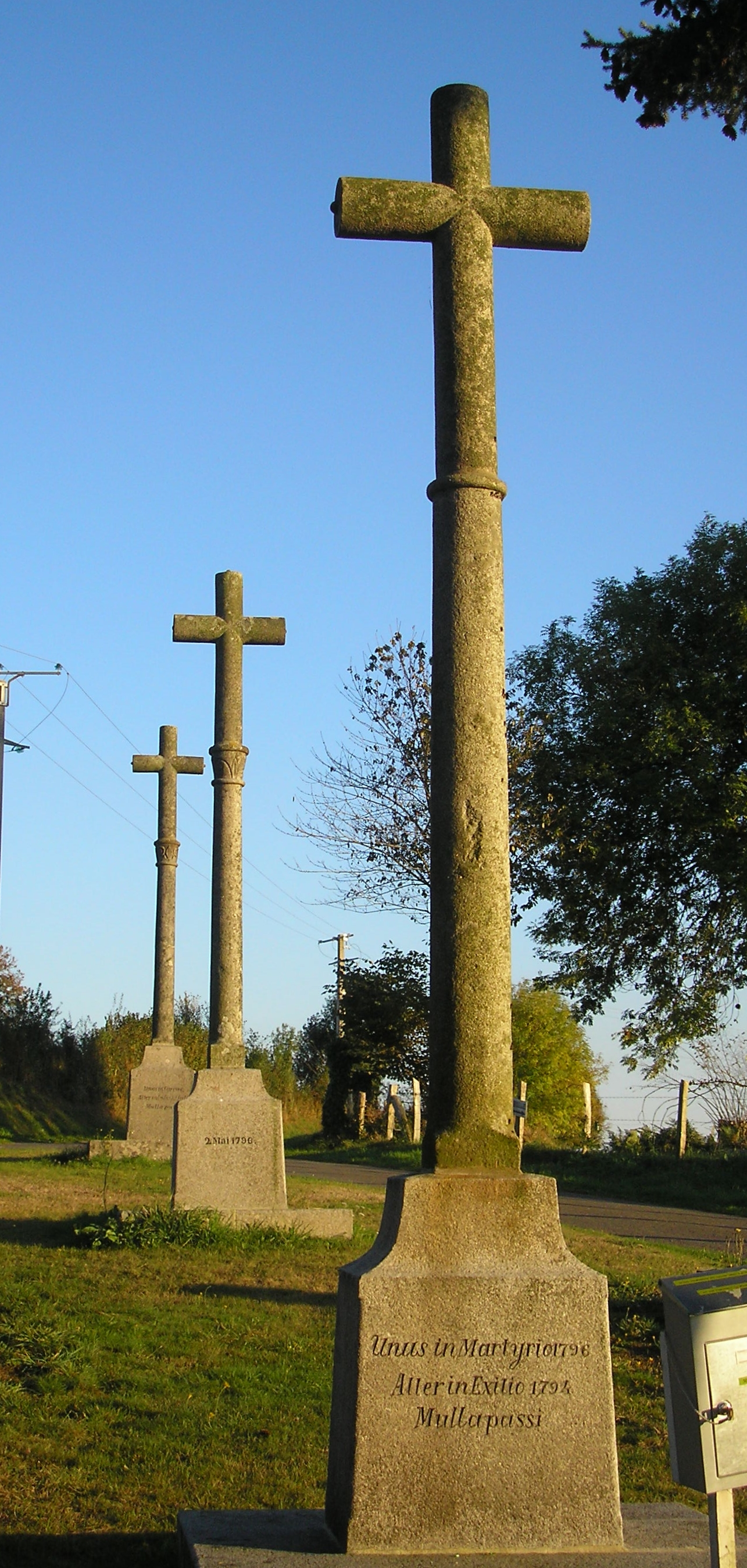 Le Petit-Celland (Normandie, France). Les Trois-Croix.